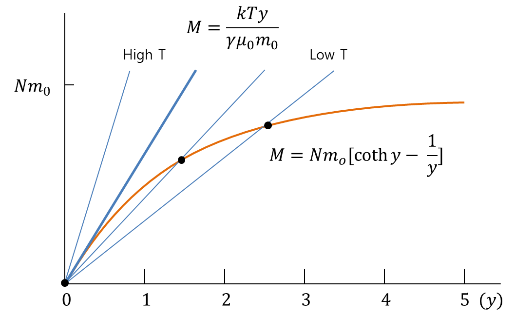 강자기성 물체의 온도에 따른 자화 그래프